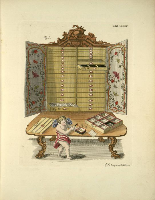 Plate from Elementa entomologica.